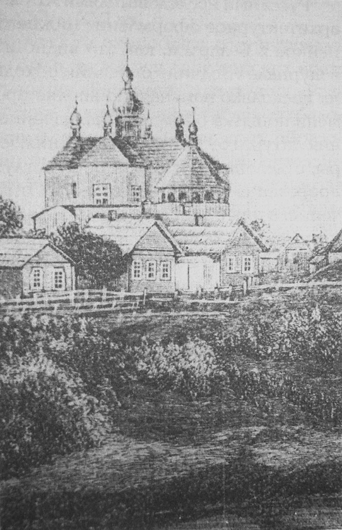 Беларуская (тарашкевіца): Дзісна (Dzisna). Манастыр